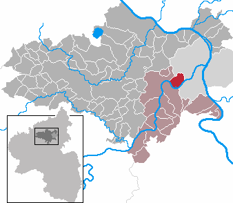 Winningen in Rhineland-Palatinate - district Mayen-Koblenz